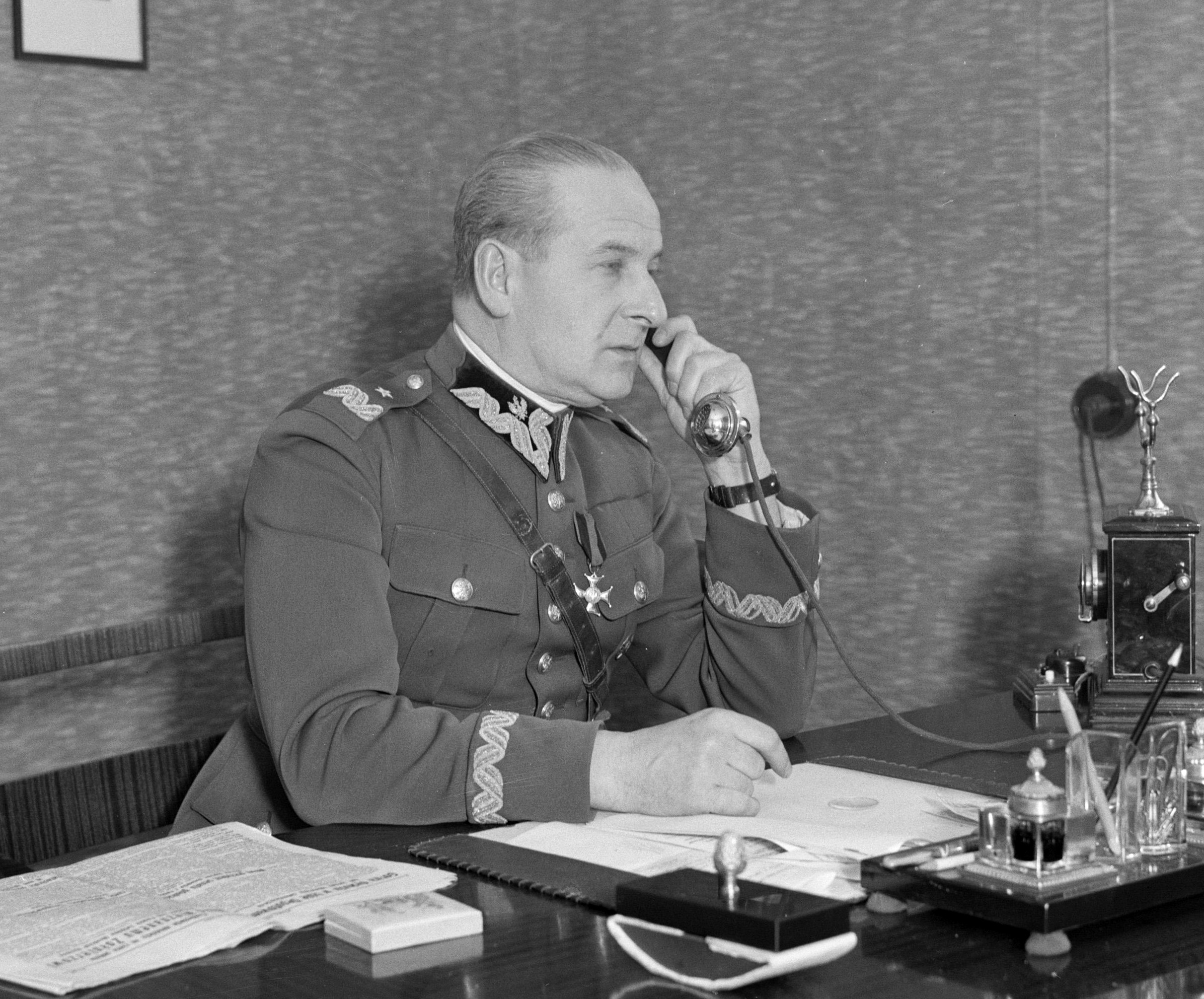 Generaal dr. med. Bolesł‚aw Wieniawa-Dlugoszowski achter zijn bureau tijdens een telefoongesprek